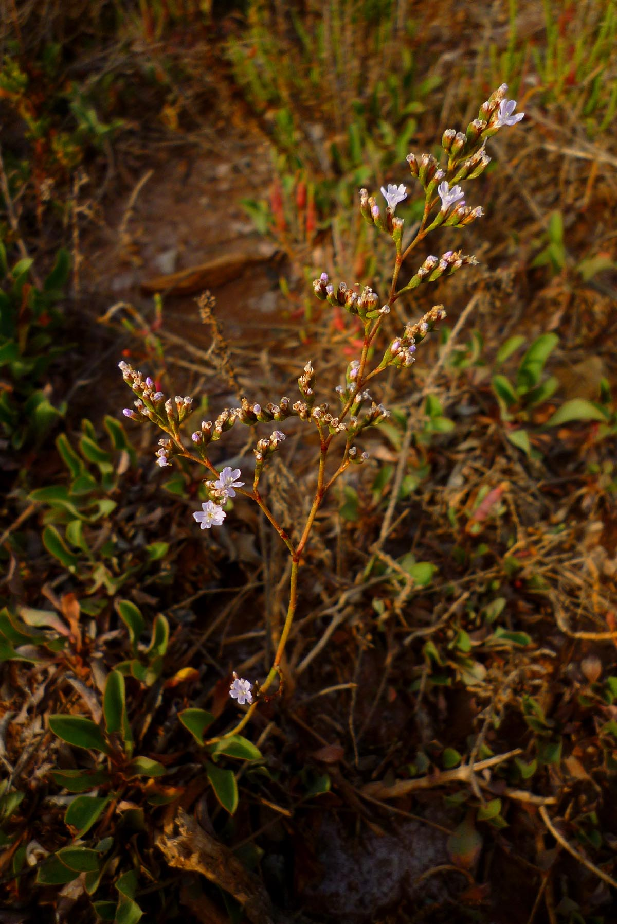 Limonium cossonianum en el Mar Menor (España).